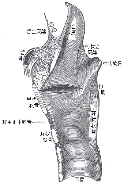 喉部和气管上部的矢状切面